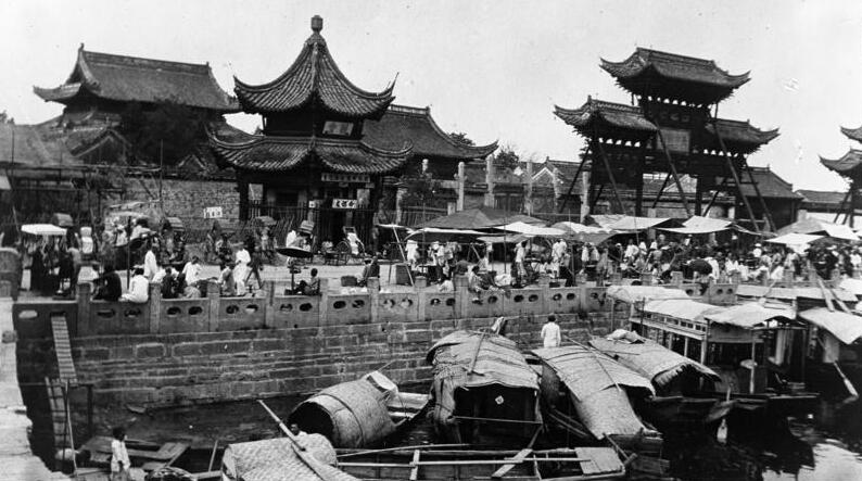 China, Nanking, Hauptstraße Nanking: Hauptstrasse